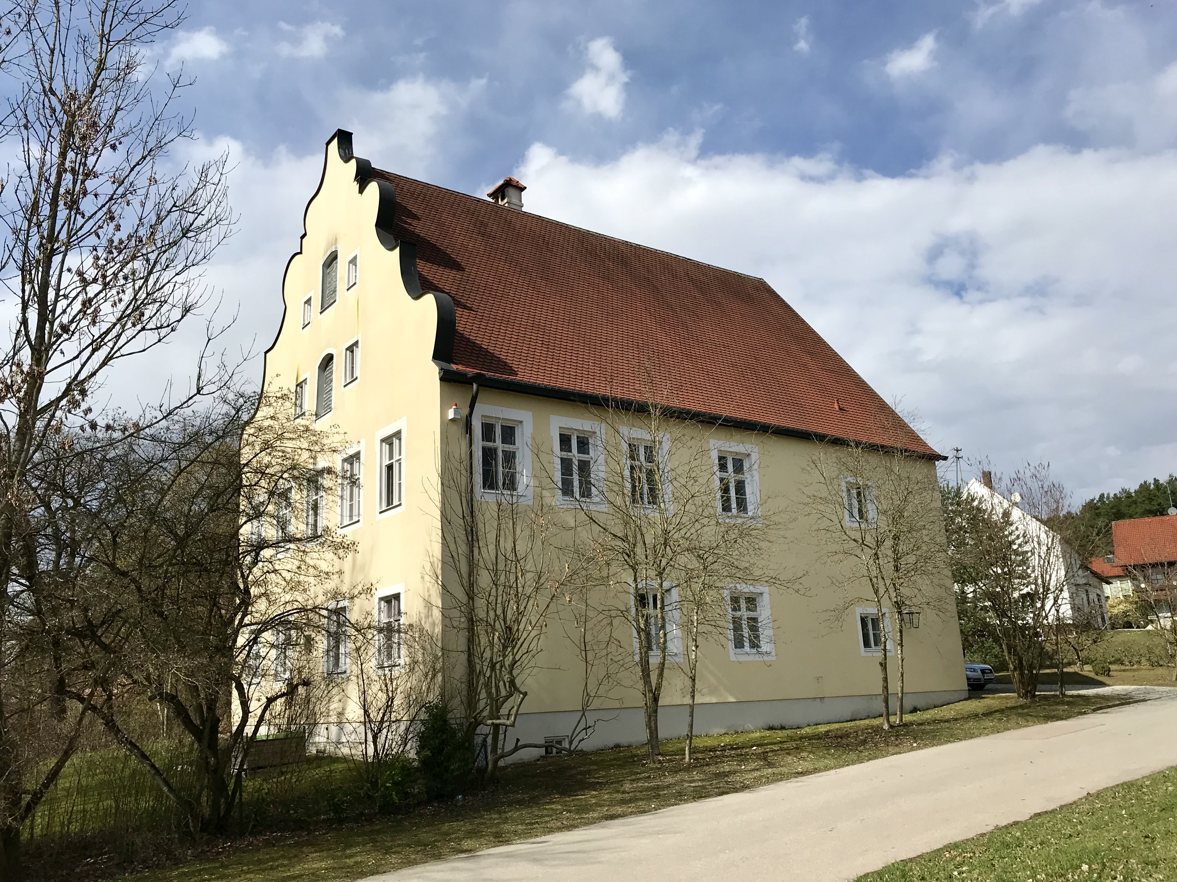 Zweigeschossiger Satteldachbau mit geschweiftem Giebel und zwei Aufzugsluken, 1690–98. Bayerisches Baudenkmal Nr. D-7-71-162-12